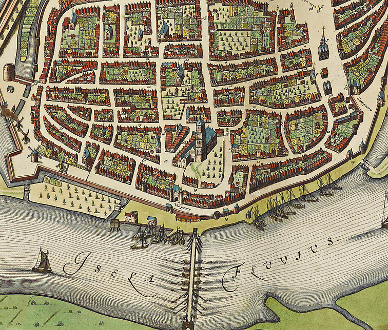 Grote Kerkhof e.o. uit de kaart van Deventer in Atlas de Wit